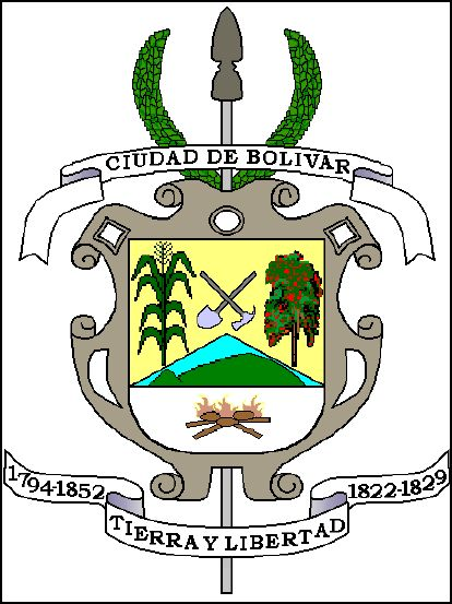 Escudo de Bolívar Cauca